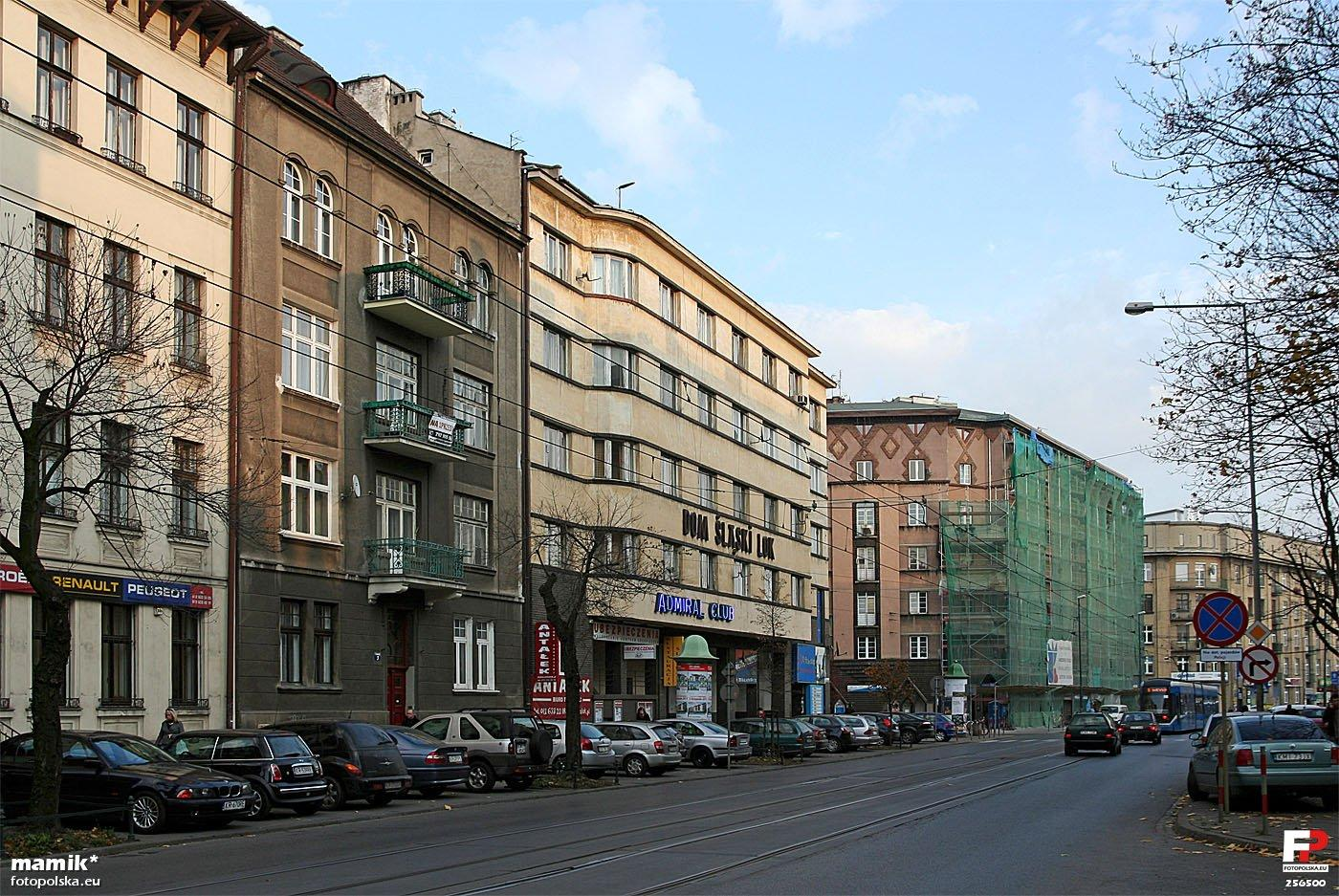 Początkowy fragment ulicy Królewskiej, widok w stronę placu Inwalidów